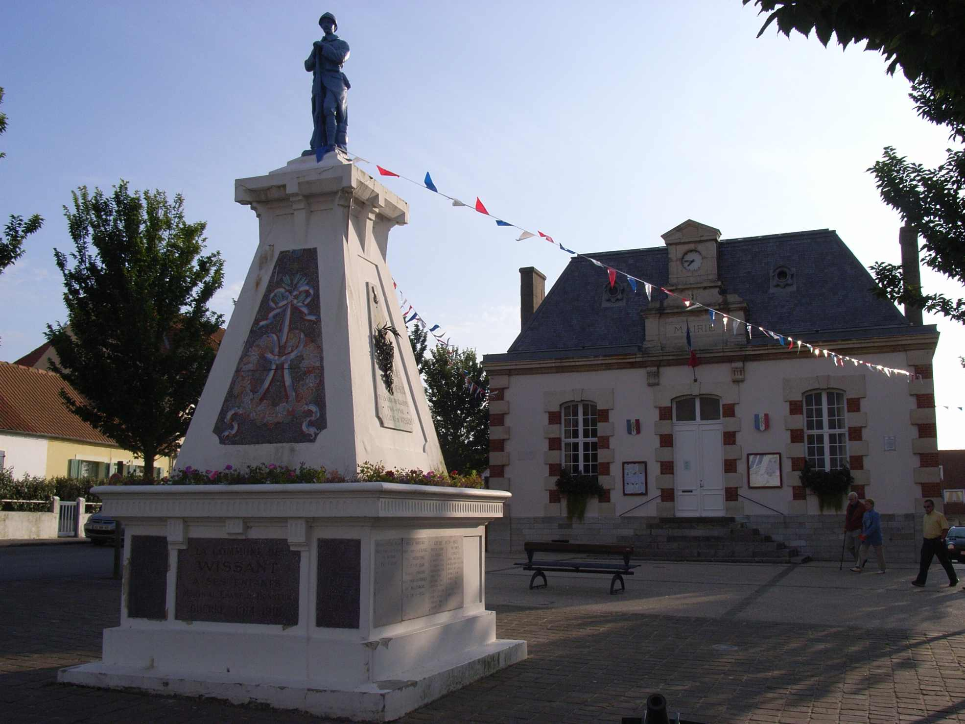 Wissant, Pas de Calais, monument de guerre et mairie